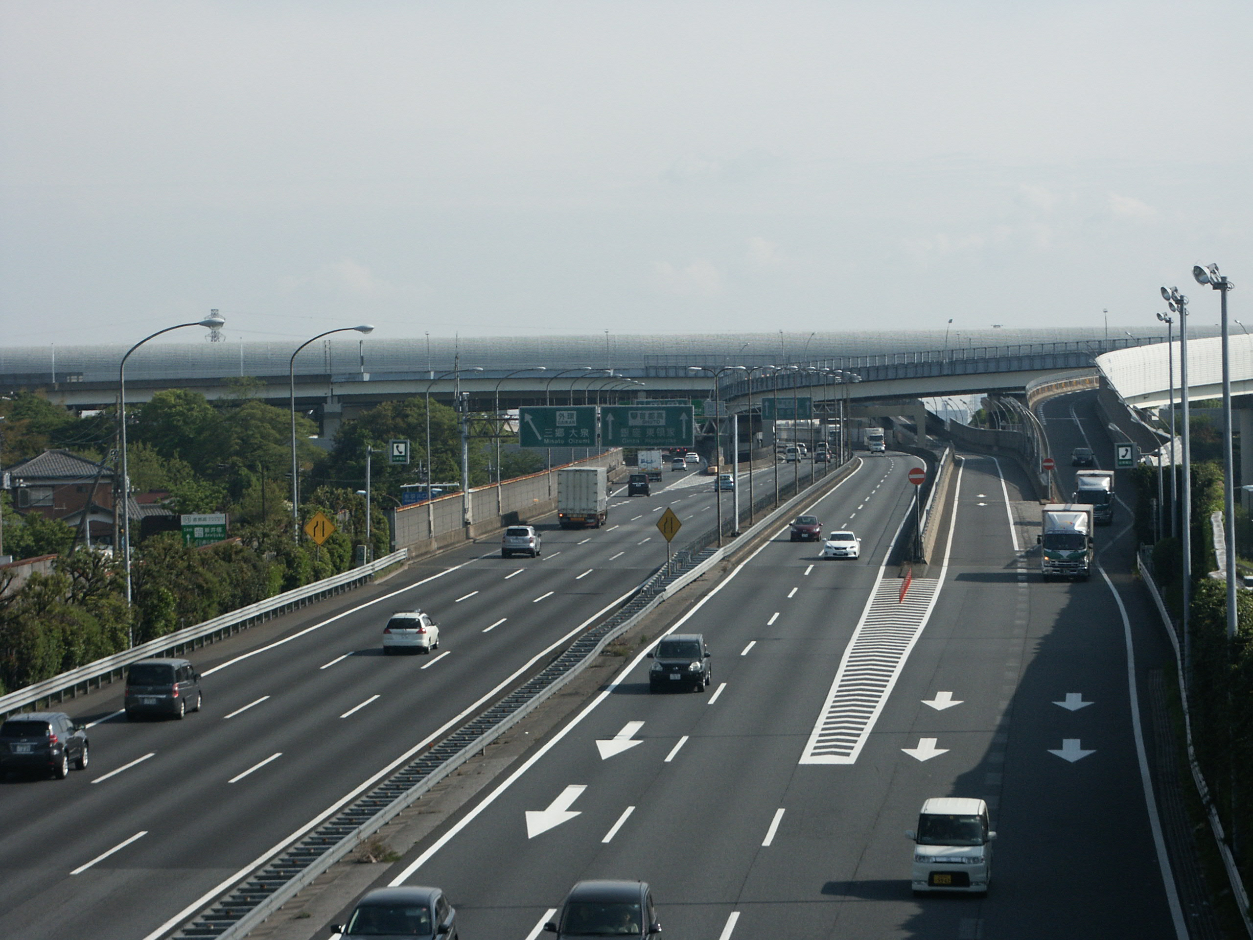 埼玉県川口市にある川口ジャンクション（東北自動車道側を撮影）